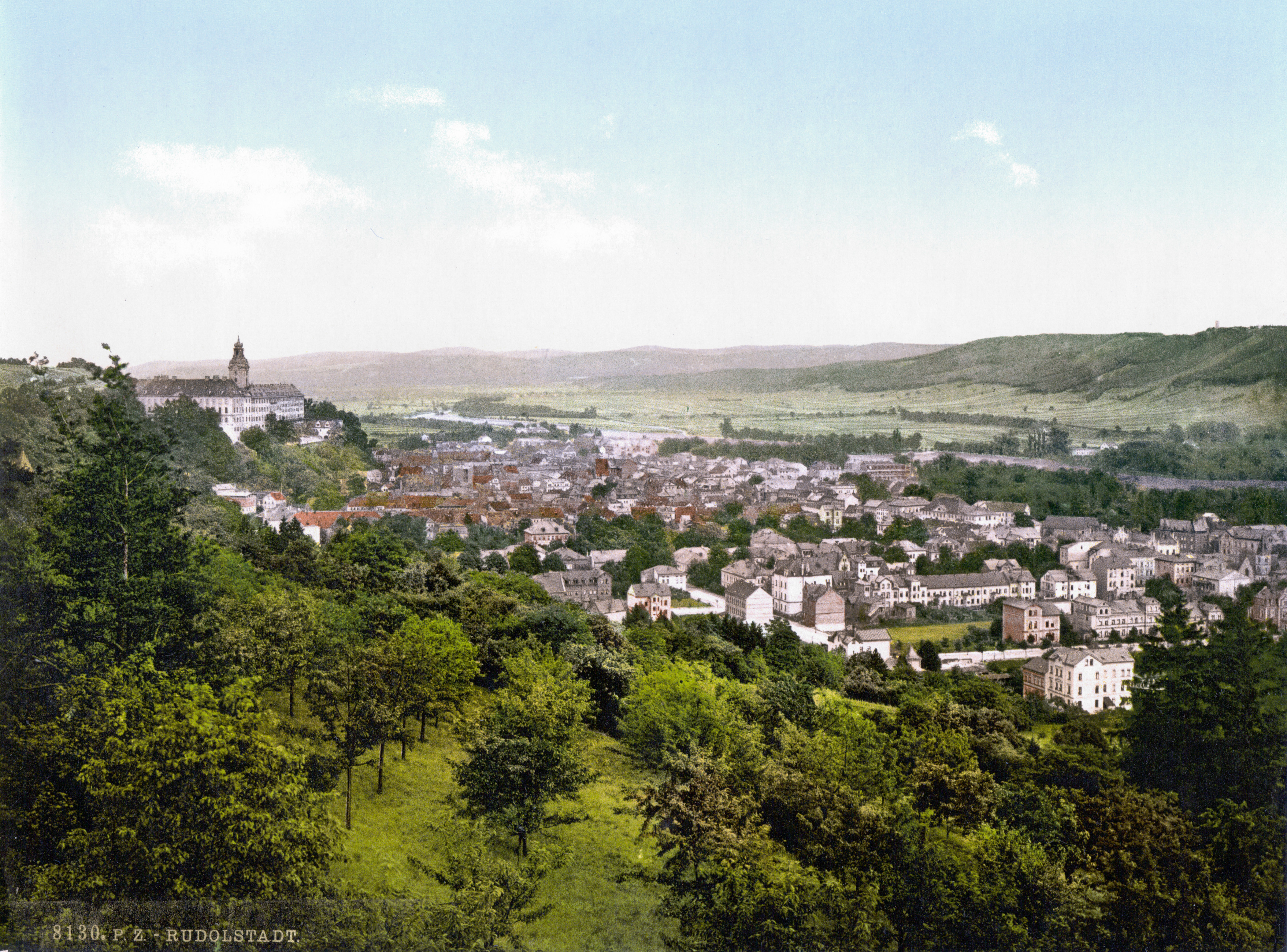 Rudolstadt